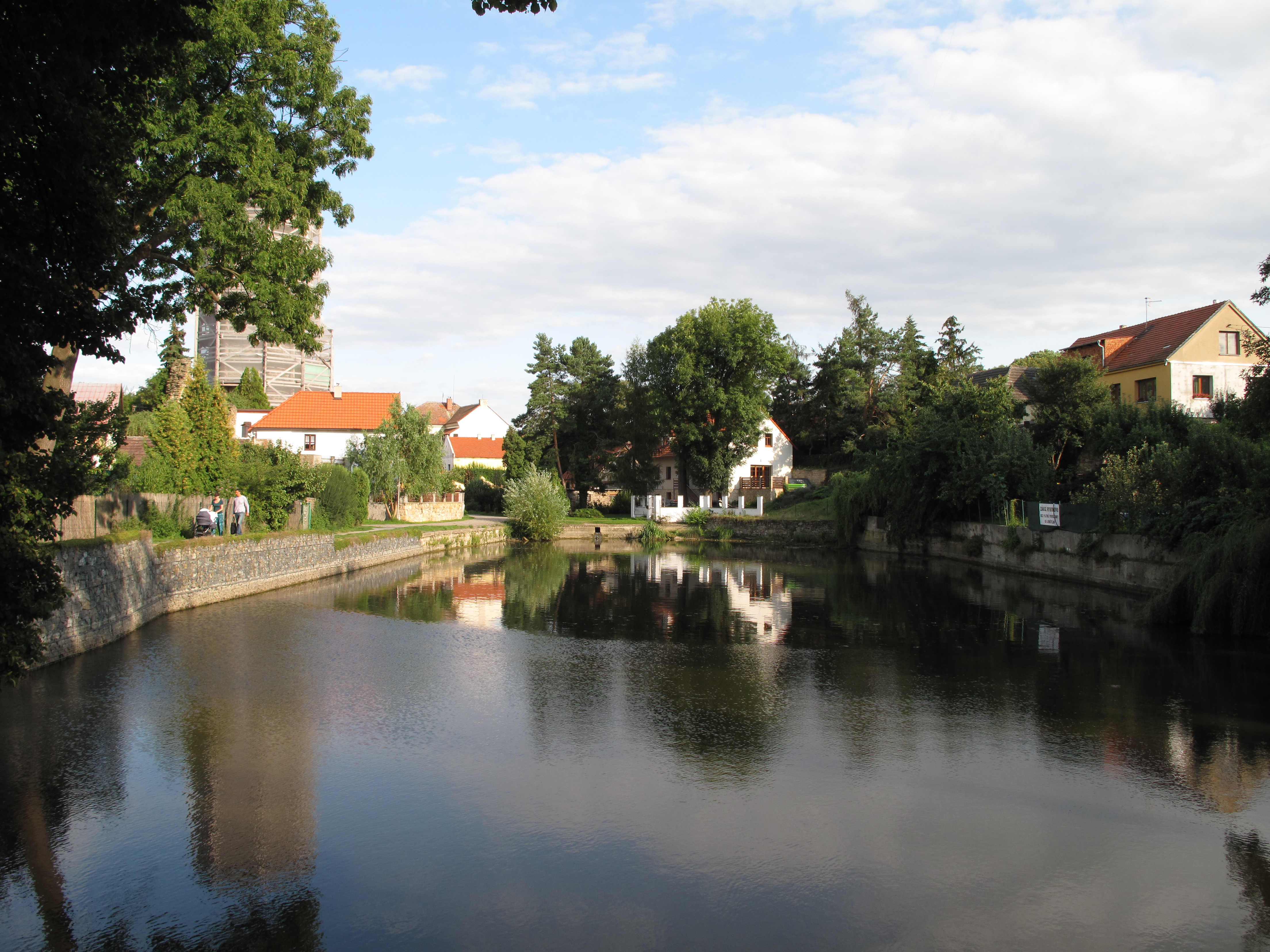 Vodní plocha Pod hradem v Jenštejně. Okres Praha-východ, Česká republika.